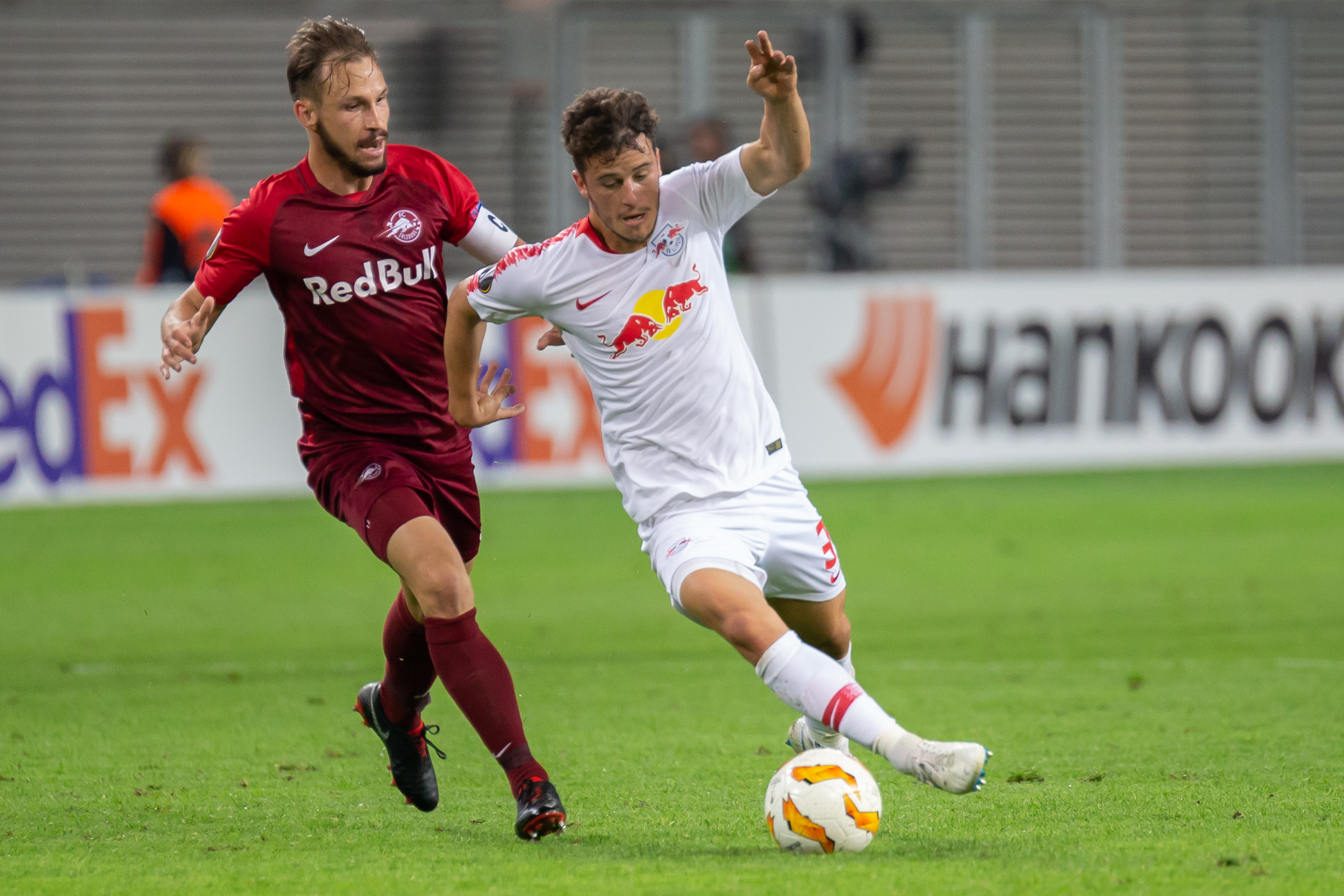 v.li.: Andreas Ulmer (Salzburg, 17), Diego Demme (RB Leipzig, 31); Zweikampf, Duell, Aktion, action